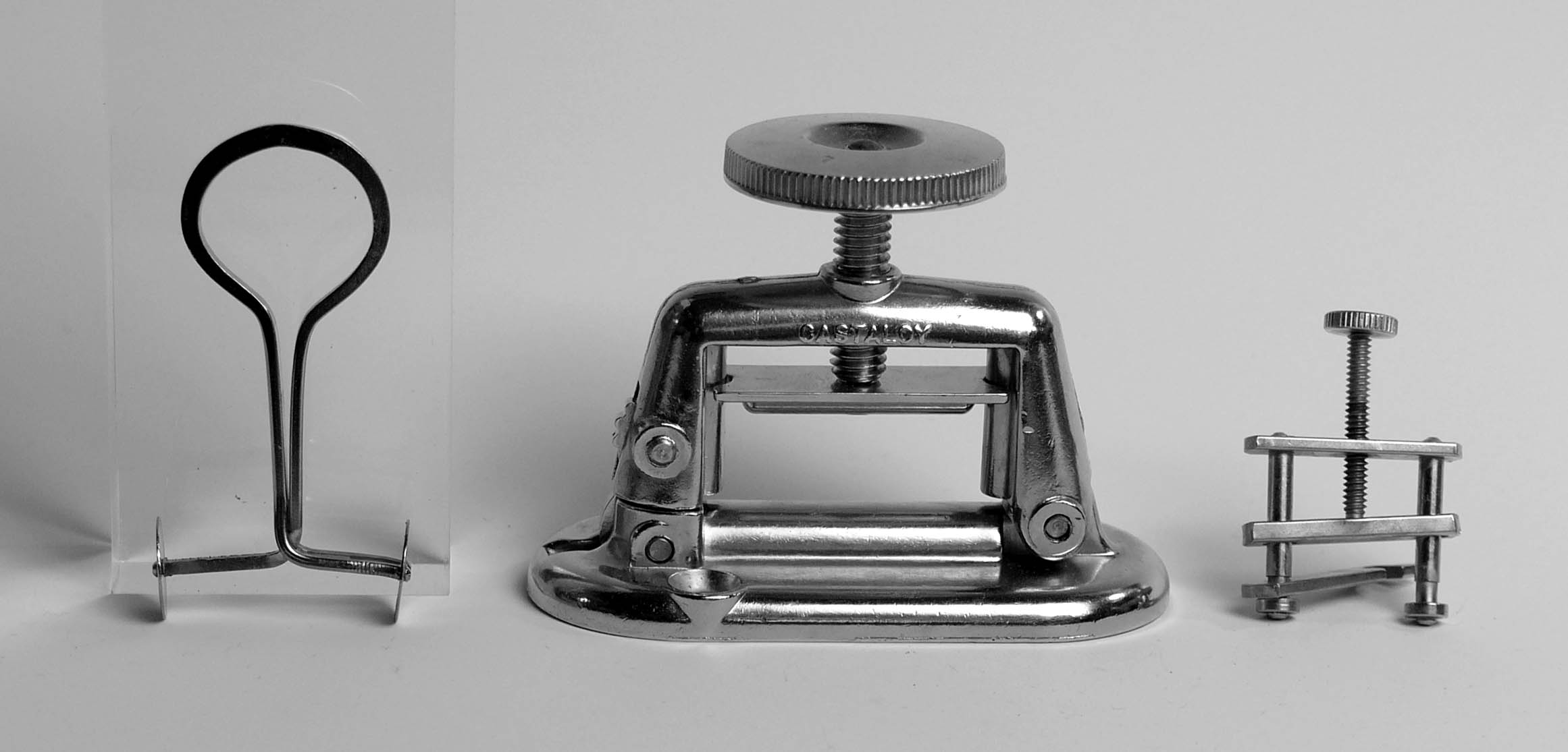 Hose clip